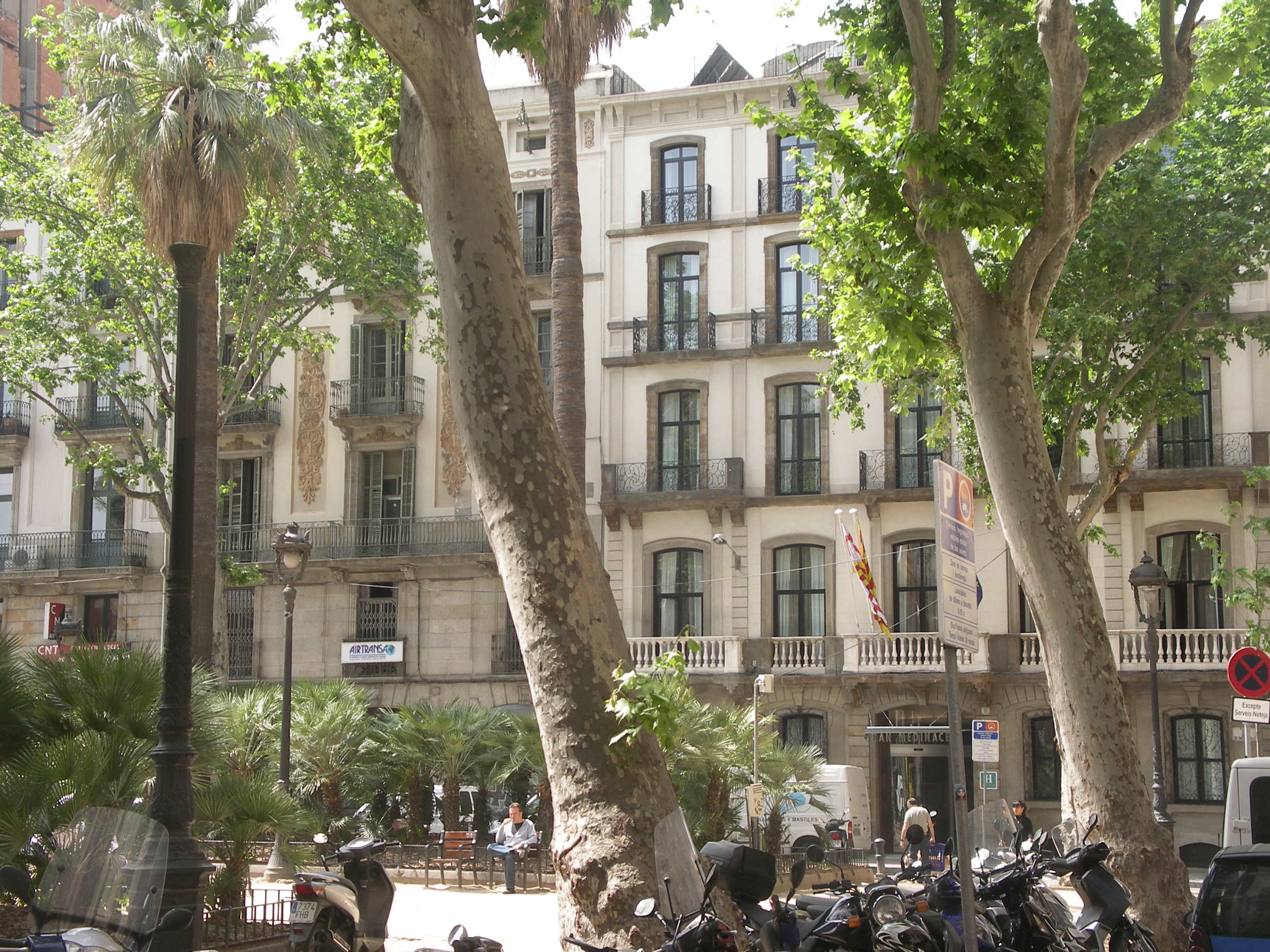 Plaça de Medinaceli, a Barcelona, que ocupa una part de l'antic convent dels Franciscans